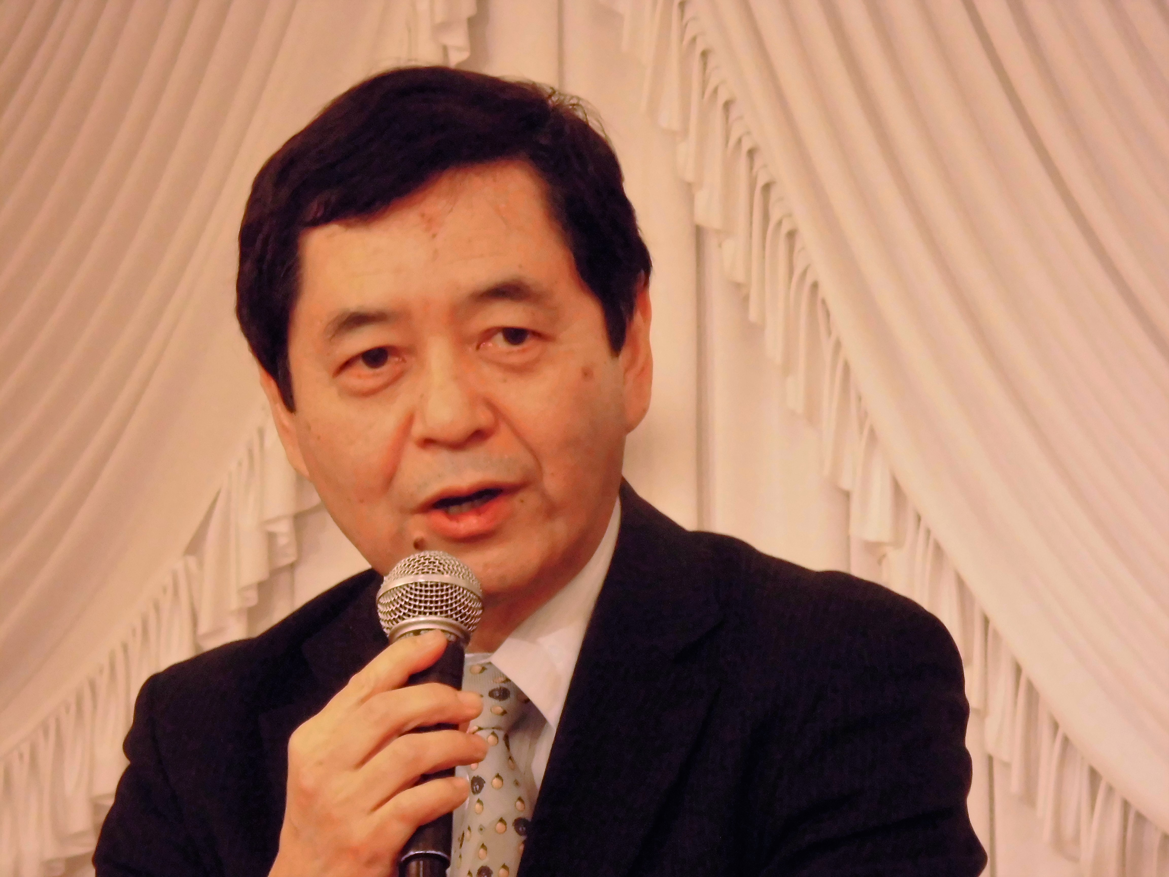 山田修路(2015-02-20)